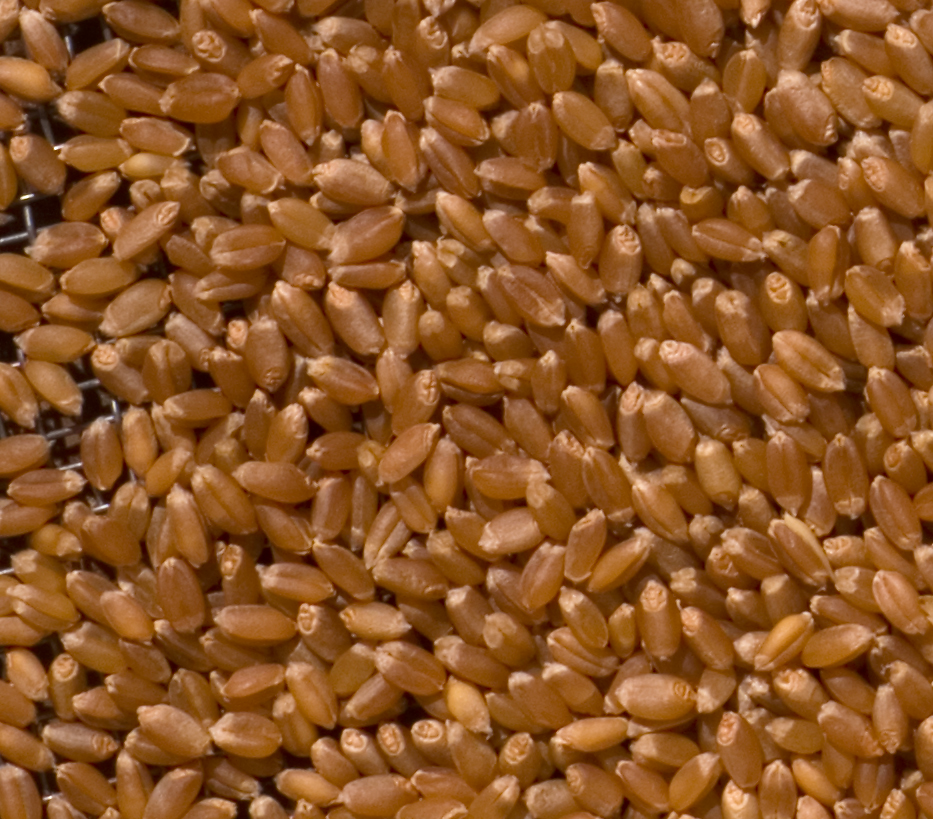 Weizenkörner, Nacktweizenkörner